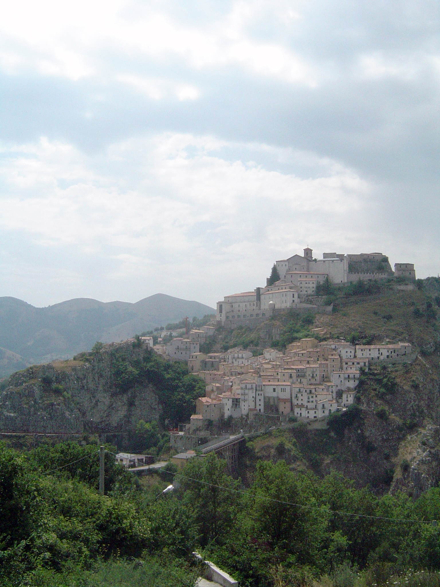 Muro Lucano (PZ), Italy